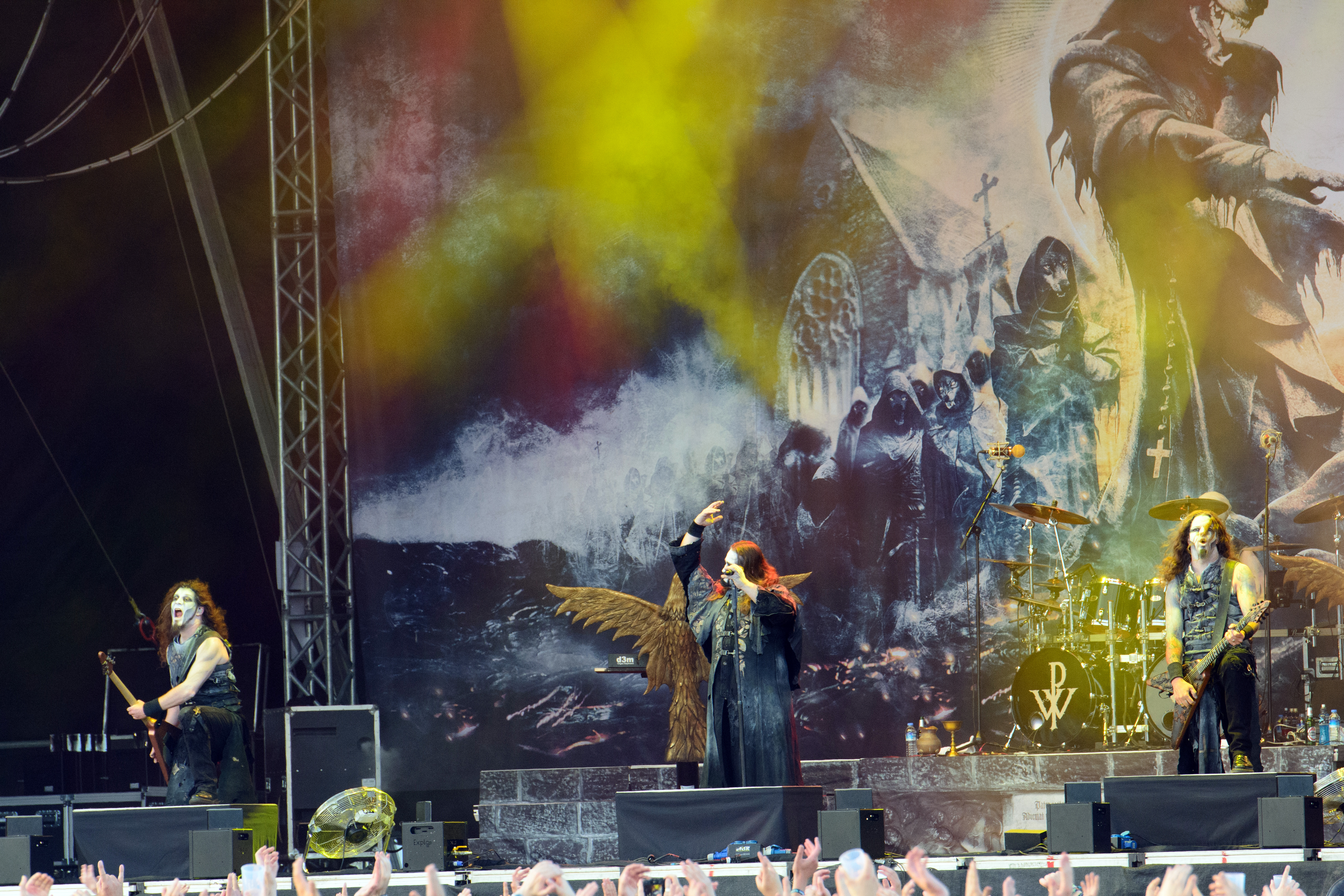 Powerwolf beim Elbriot 2016